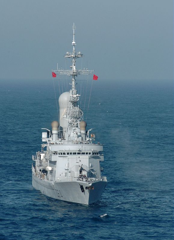 Frégate antiaérienne type 70 Cassard